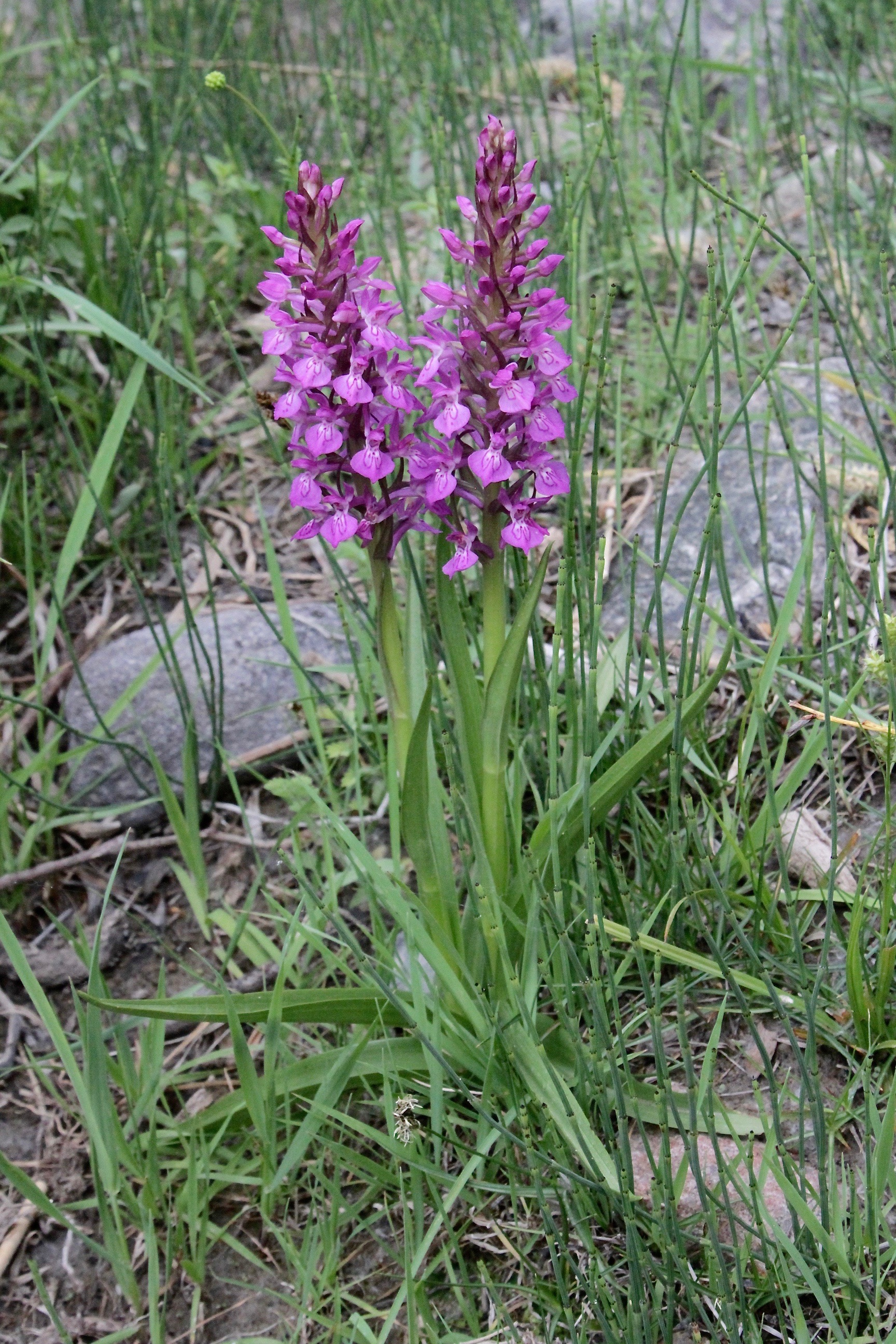 Uzbekistan, Kugetang mountains, Surkhanskiy Nature Reserve. Rus: Узбекистан, Сурхандарьинская обл., Шерабадский р-н, вост. склон хр. Кугитангтау, Сурханский государственный заповедник.